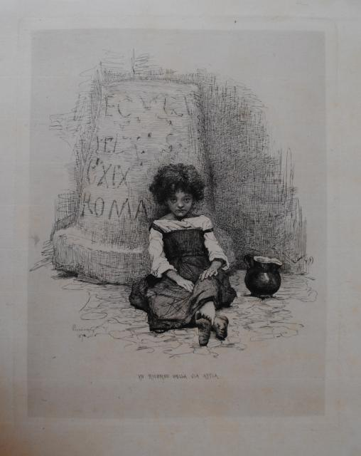 Antonio Piccinni (Trani 1864 – Roma 1920) Un ricordo della Via Appia Acquaforte originale Misure mm lastra mm 290 × 212, foglio 375 × 273 Lastra incisa nel 1878 e che avrebbe dovuto essere inserita ne “L’eau-forte en 1879. Souvenirs de Rome”, album composto da dodici fogli numerati tutti incisi da Piccinni, pubblicato a Parigi dalla vedova Cadart. Nonostante le scritte nei margini (esemplare della Biblioteca Panizzi) confermino la destinazione, l’album pubblicato non contiene questo soggetto. Con ogni probabilità si verificò una sostituzione dopo aver già tirato qualche esemplare del foglio. Impressione eccellente del I/II stato prima delle lettere, stampata su carta japon vergellata fissata sui due angoli superiori a un cartoncino bianco spesso; pubblicata dalla vedova Cadart su “Trente eaux-forts par trente artistes” nel 1879. Bibliografia: A. Petrucci, A. Piccinni incisore, Bari 1931; G. Bassi “Antonio Piccinni”, Fasano di Puglia 1978, tav 46; F. Fiorani G. Scaloni, “A. Piccinni incisore”, Roma 2005, n 1.14; Scheda tecnica di Matteo Crespi, Il bulino antiche stampe Milano, 2012.